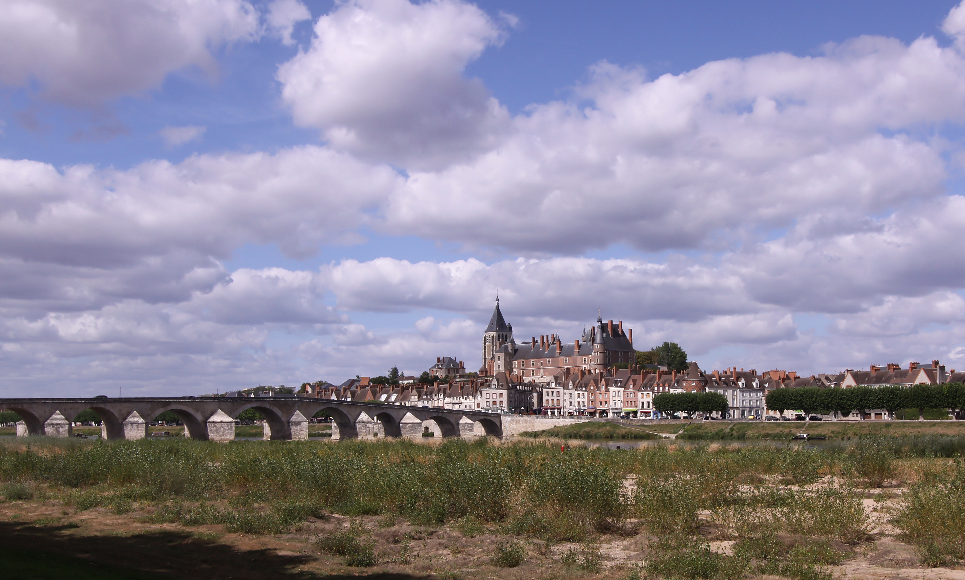 Blick auf Schloss und Stadt Gien an der Loire im französischen Département Loiret